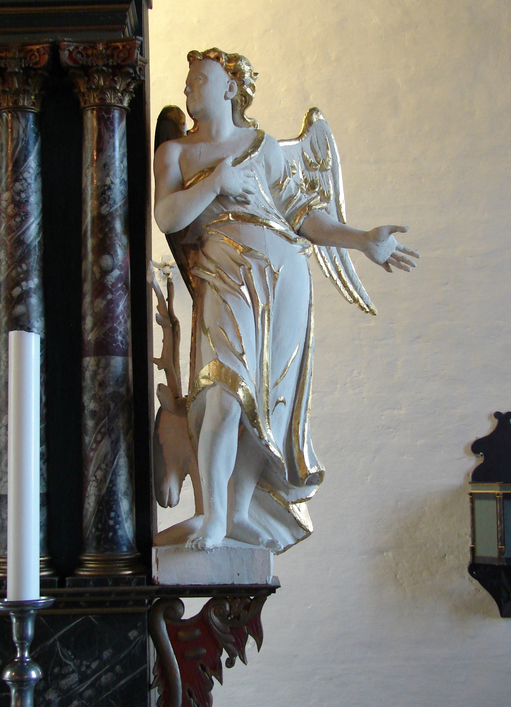 Skulptur fra altertavle udført af Hartvig Müller, Frederiksvern/Stavern Kirke, Vestfold, Norge